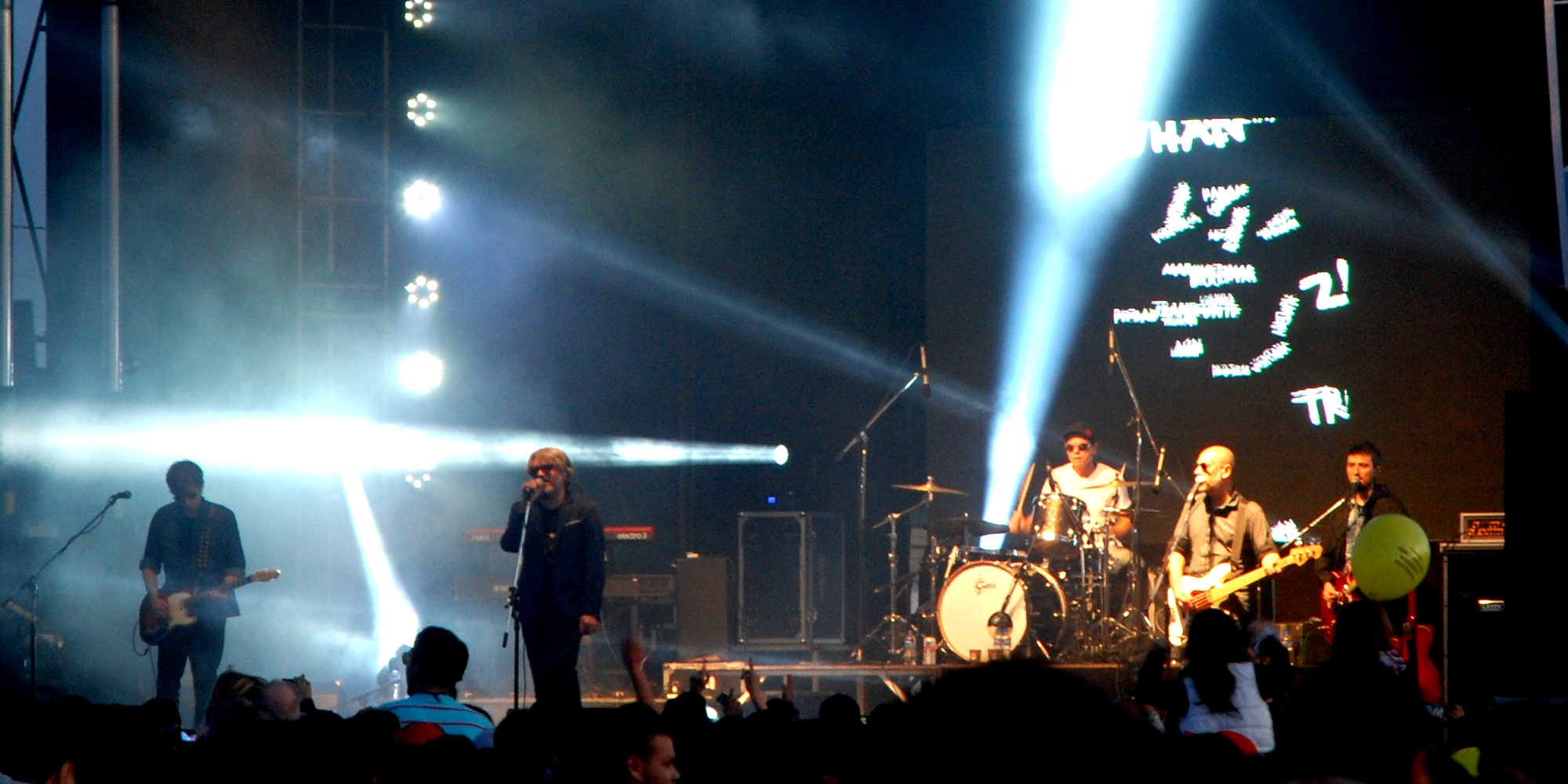 Estelares en 19 y 72, La Plata.